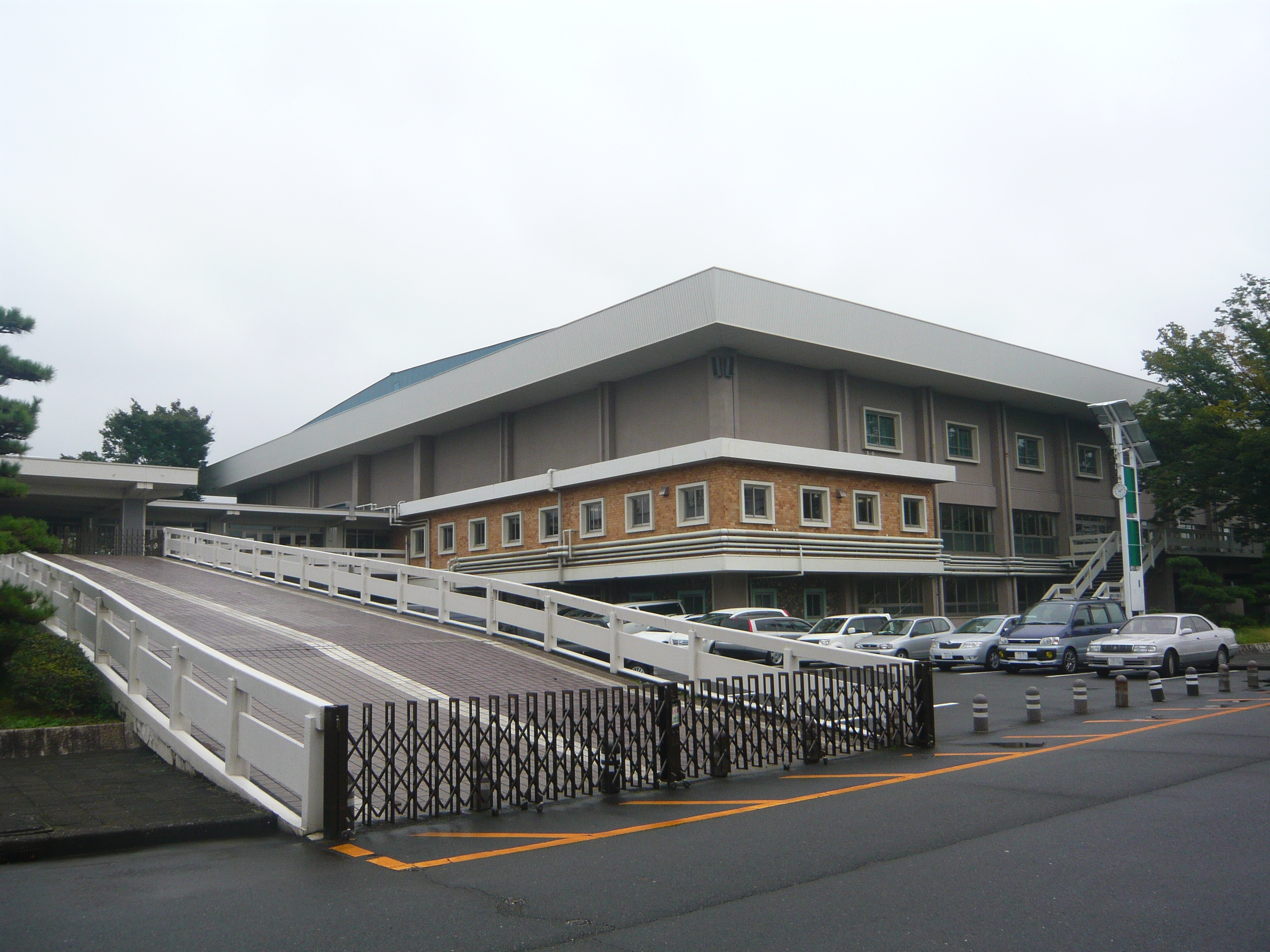 Gifu Arena（岐阜アリーナ）,Gifu,Gifu(岐阜県岐阜市)で撮影。